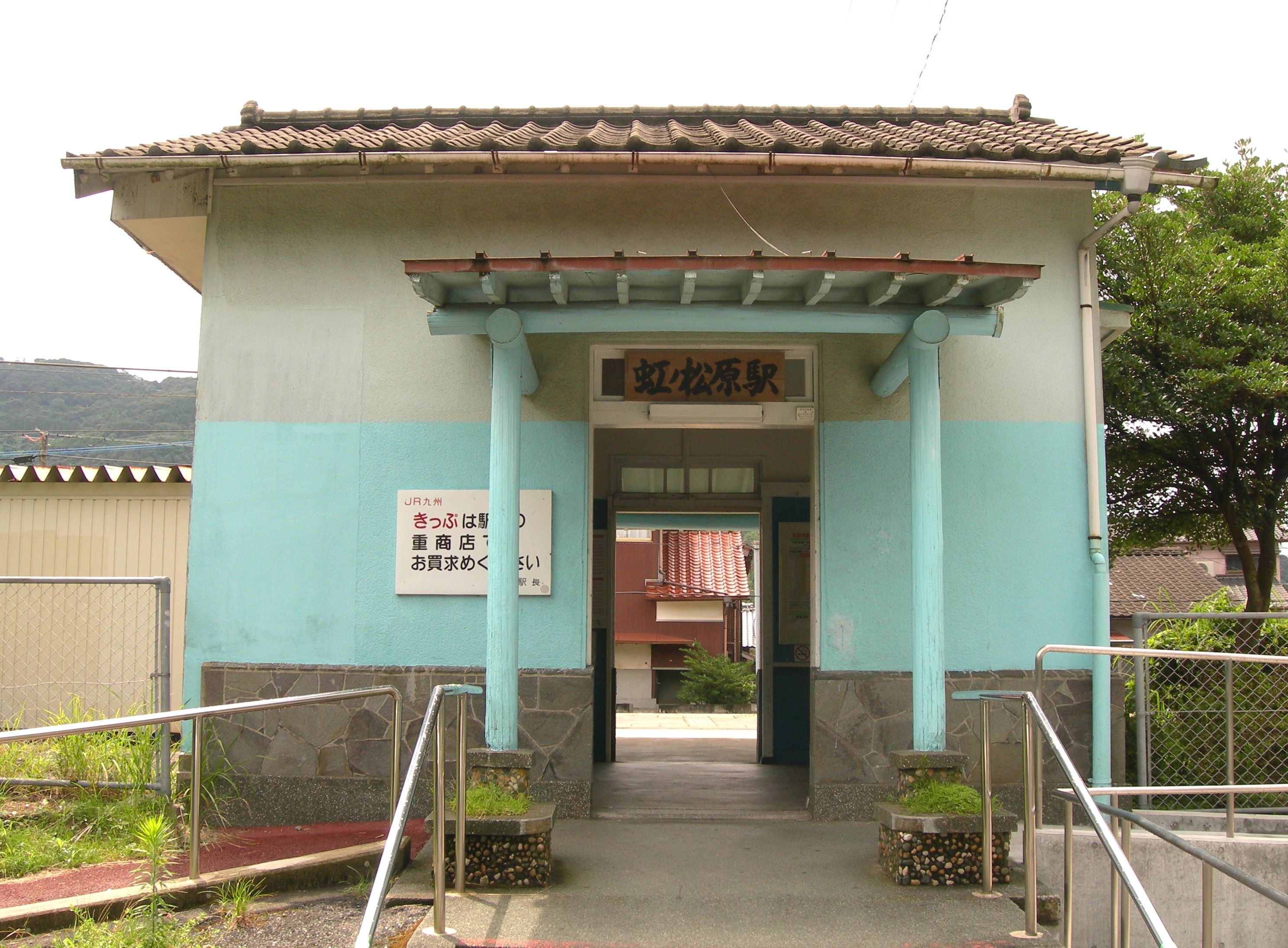 JR九州 虹ノ松原駅